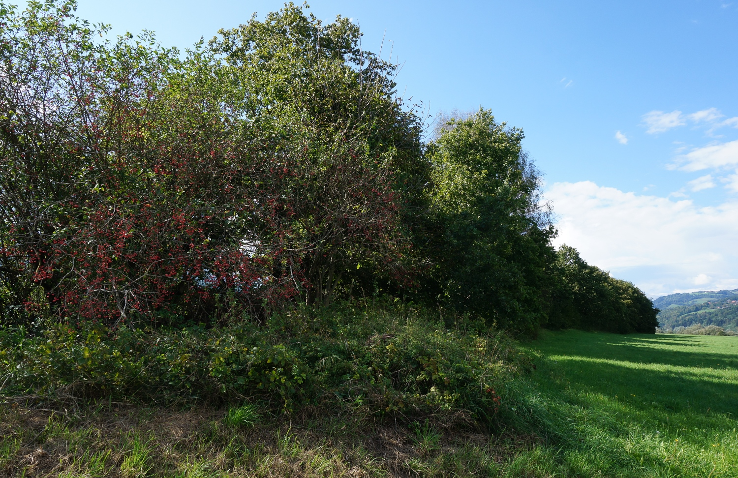 Befestigte Siedlung Stadtgörz Erdwall, Feistritz an der Drau, Marktgemeinde Paternion, Villach Land, Kärnten, Österreich, Europäische Union